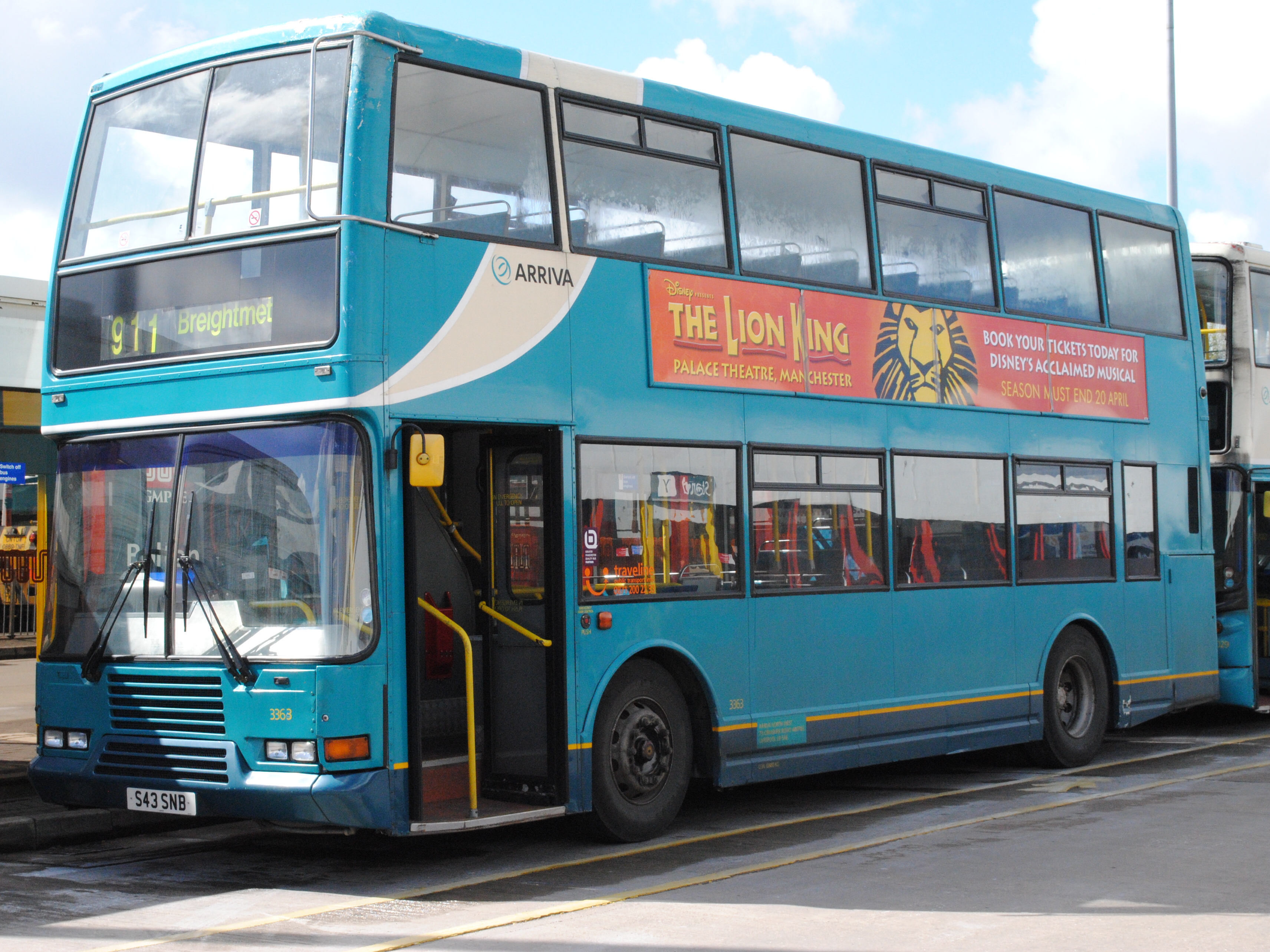 Volvo Olympian ELC Pyoneer.